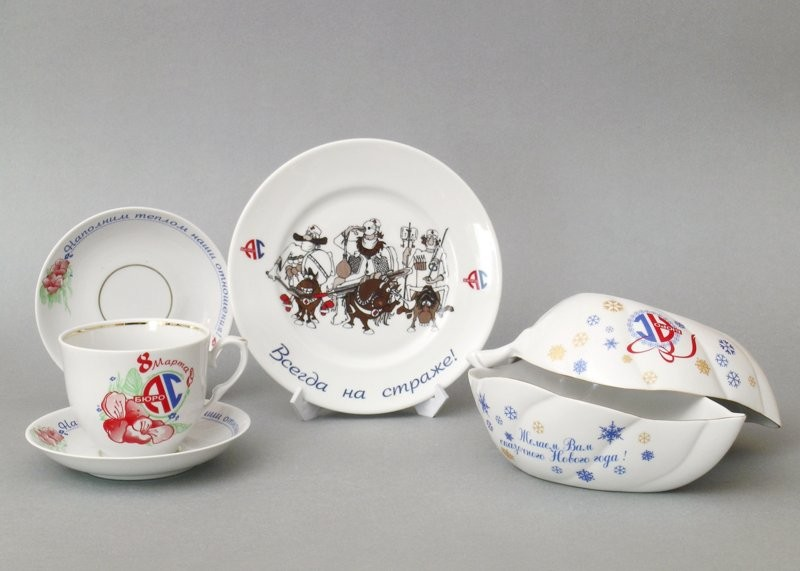 Сысертский завод